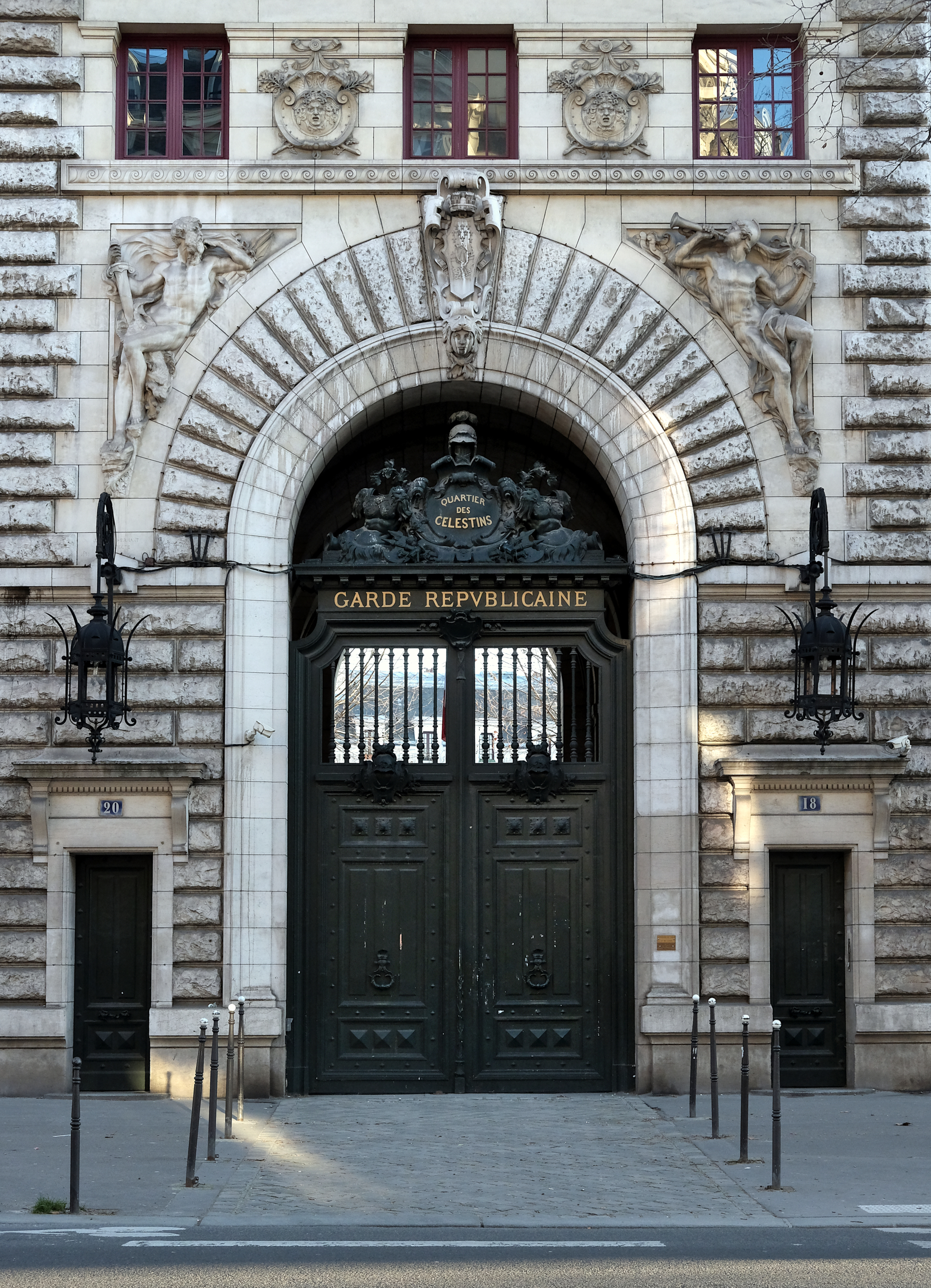 Paris IV - Entrée de la caserne des Célestins, boulevard Henri IV.